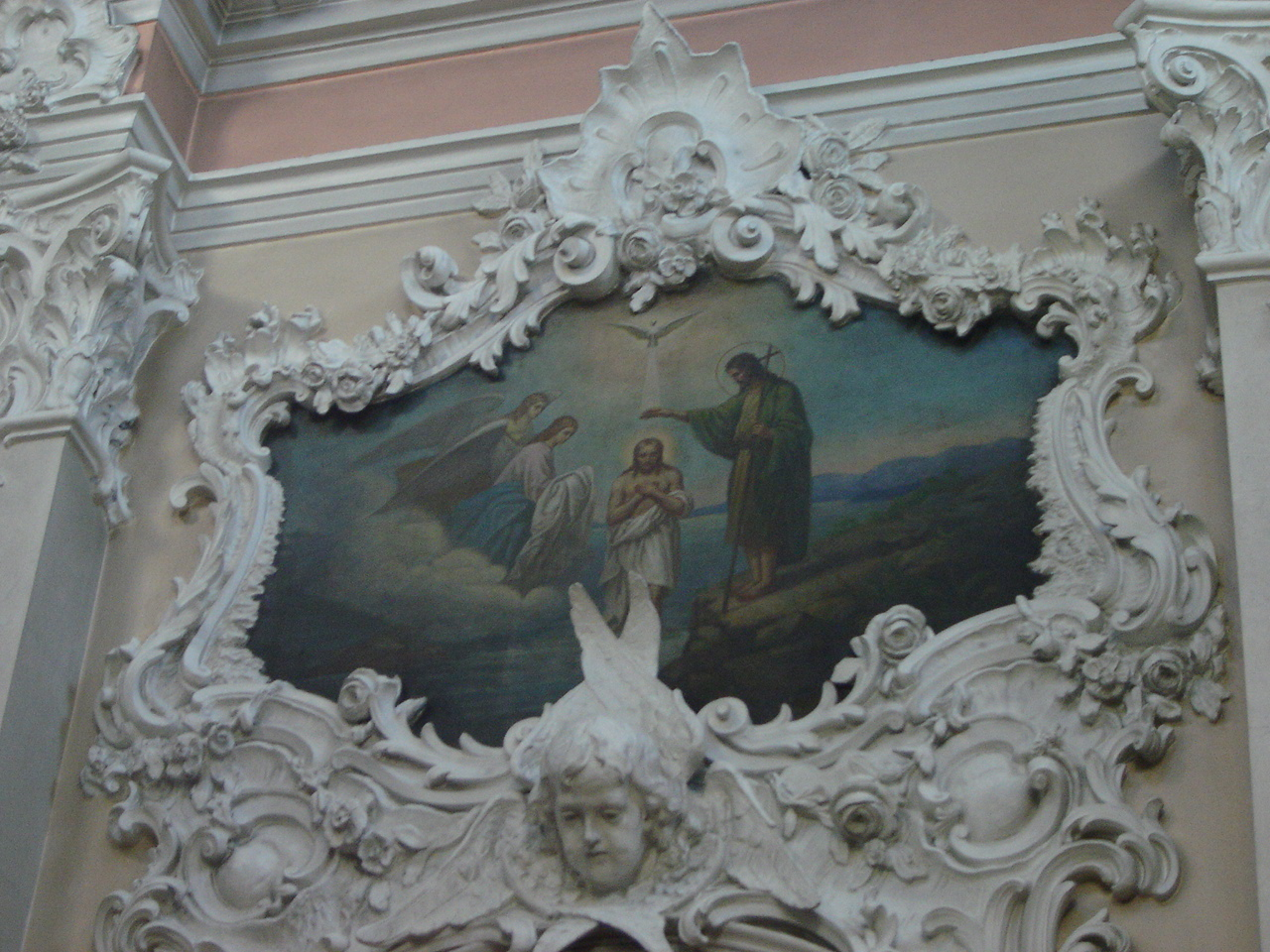 Фреска "Крещение Христа", обрамленная лепниной в стиле барокко в церкви Святого Духа в Вильнюсе, Литва.